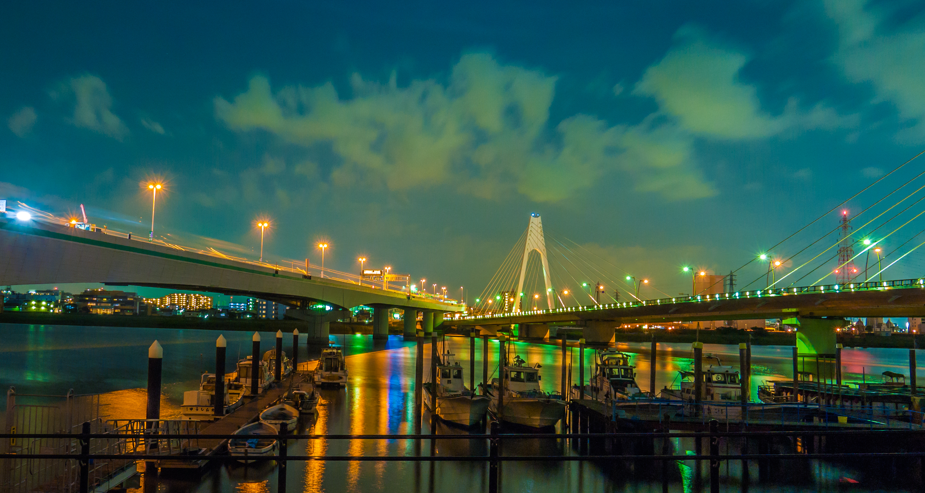 大師橋を多摩川北岸（東京都大田区）から南方方面へ見る。左側に首都高速神奈川1号横羽線が見える。